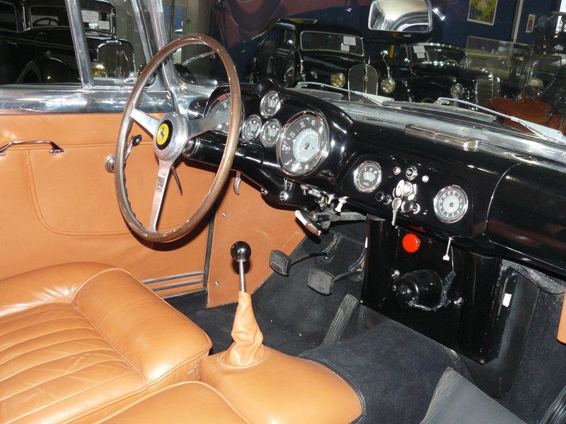 Retromobile 2012